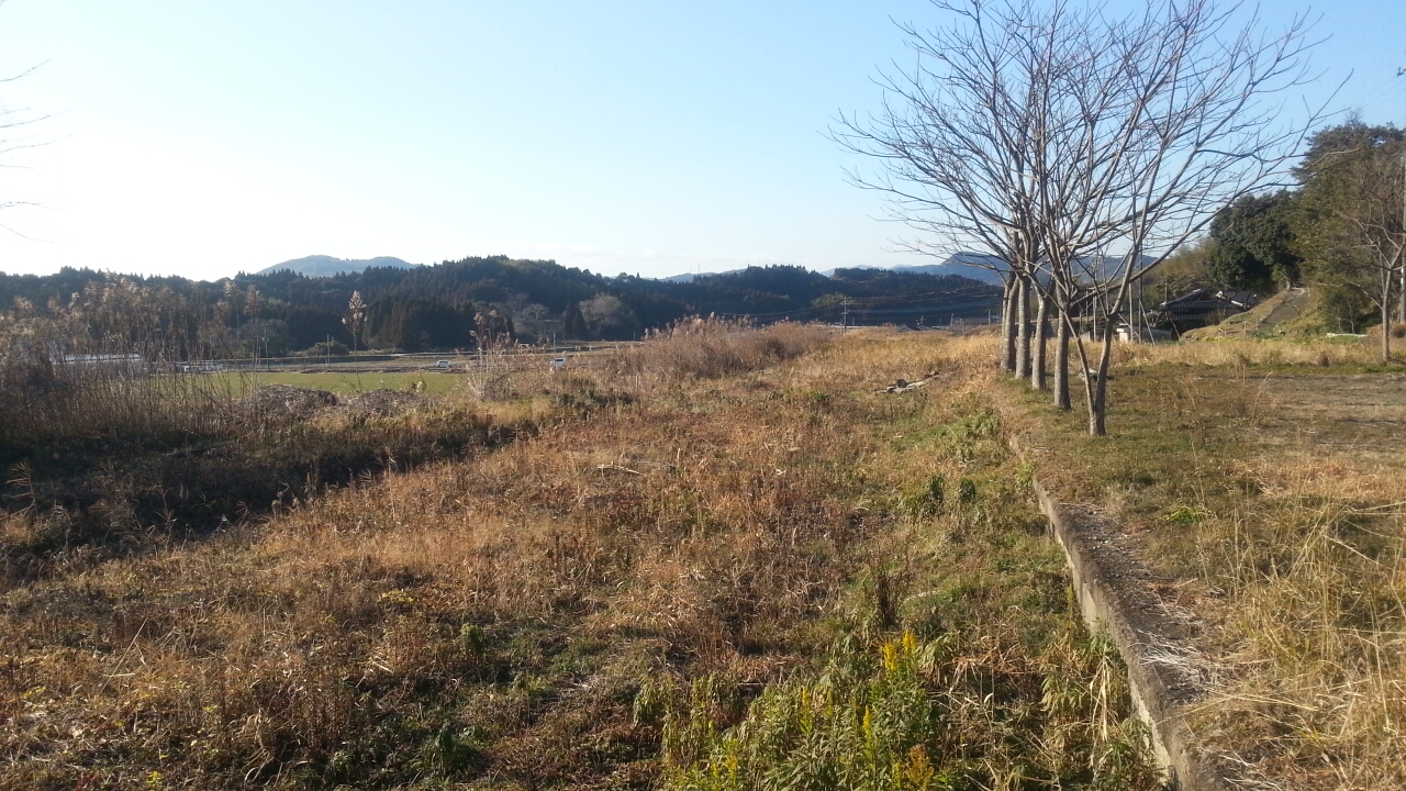 薩摩山崎駅ホーム跡 左の草叢が線路跡